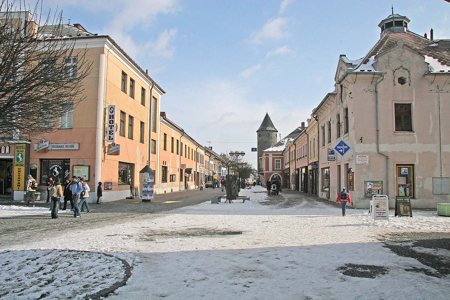 Náměstí Jana Žižky z Trocnova v Čáslavi autor: Prazak date: 13. 3. 2006